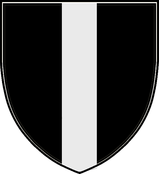 Vapensköld för danska adelsätten Brahe